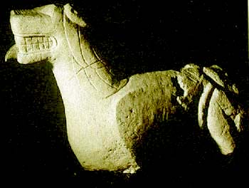 Perro o felino íbero hallado en el término de Bujalance, Córdoba.